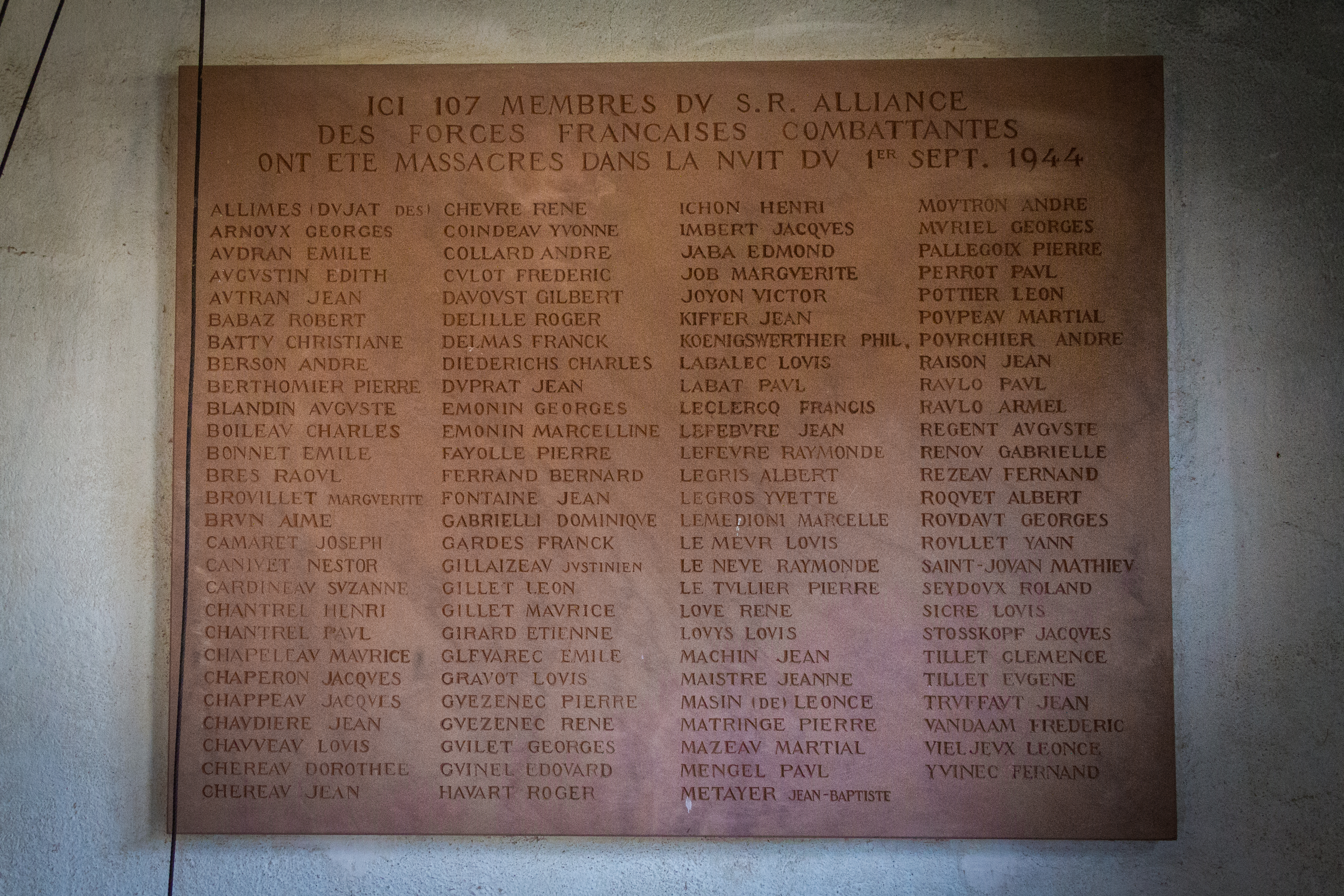 Camp de concentration de Natzwiller-Struthof. La plaque à la mémoire des 107 membres du Réseau Alliance massacrés au Struthof.